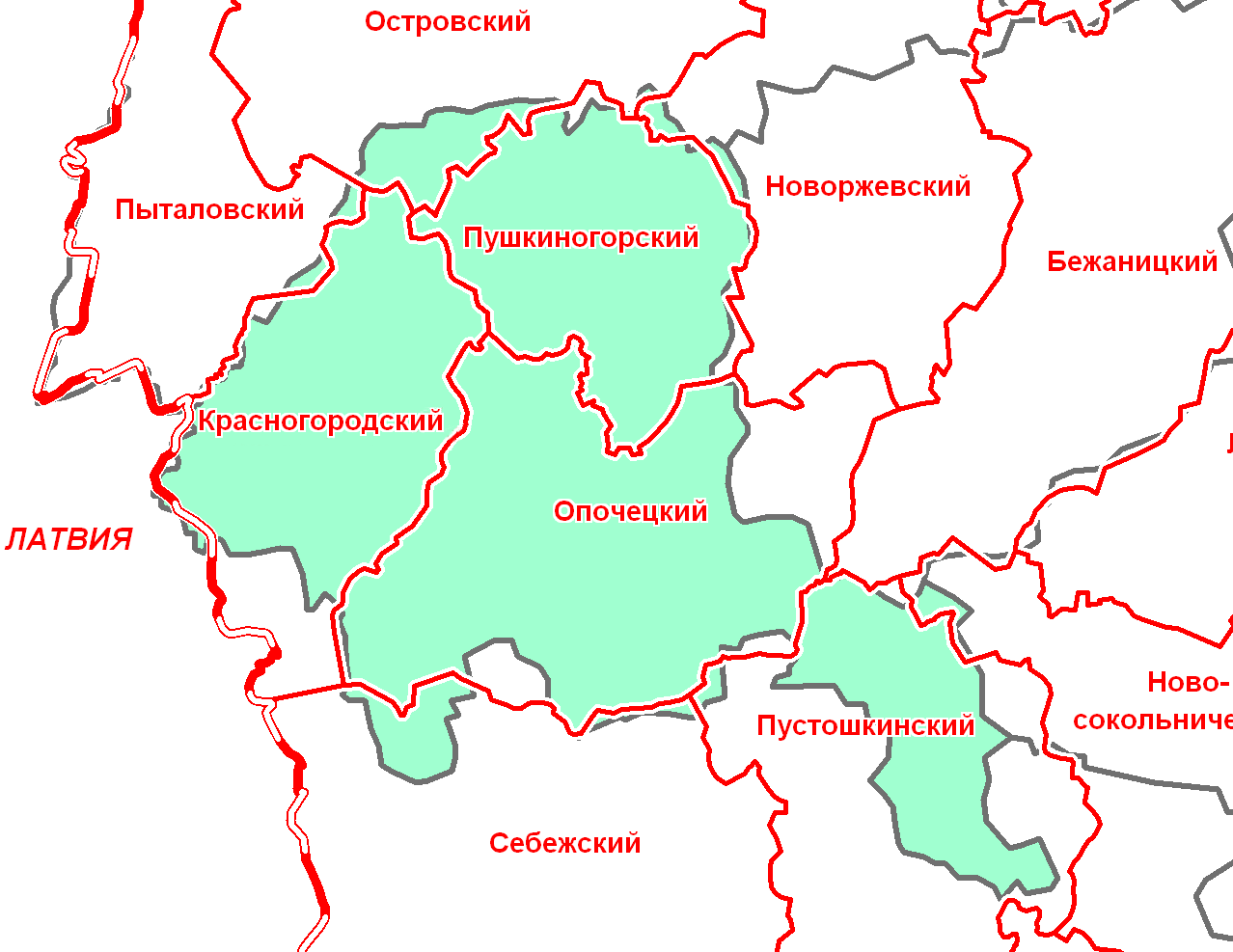 Опочецкий уезд Псковской губернии в современной сетке районов